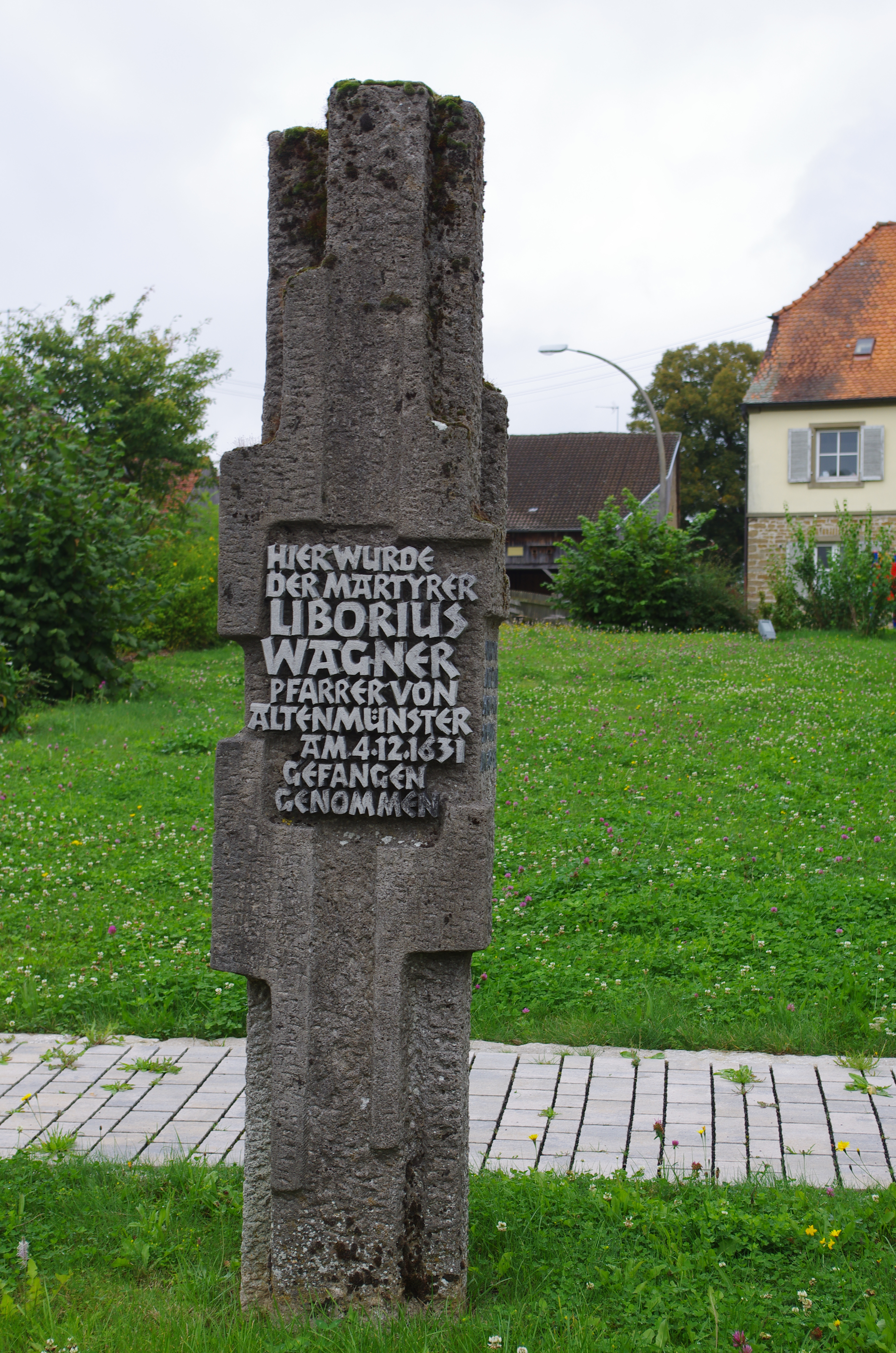 Stele anlässlich der Seeligsprechung von Liborius Wagner, vor der Kirche , Herrenseestraße 20, Reichmannshausen, Gemeinde Schonungen, Landkreis Schweinfurt, Unterfranken, Deutschland